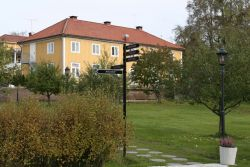 Annex byggnaden på Herrestad Säteri som renoverades 2008 omsorgsfull.